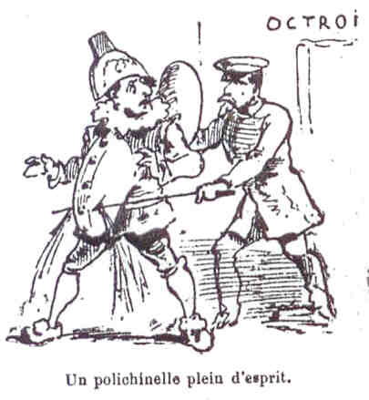 Dessin comique, fraudeur à l'Octroi